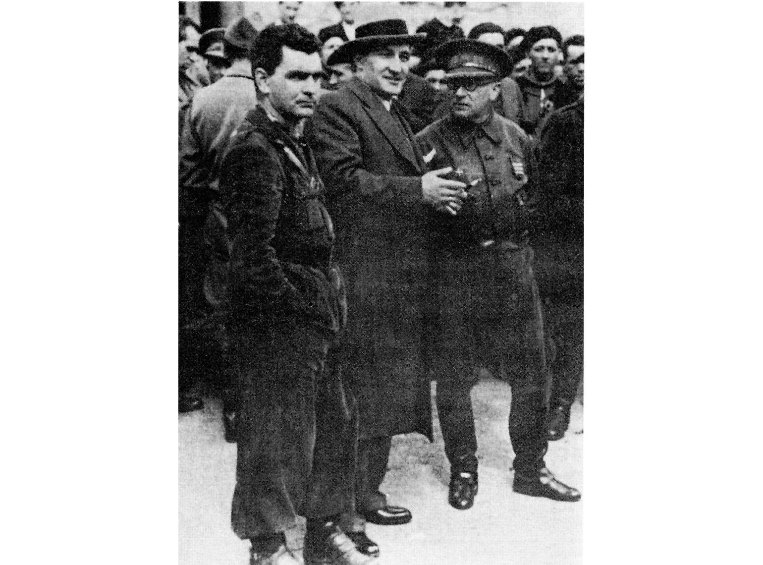 De izquierda a derecha: Tatxo Amilia, José A. Aguirre Lecube (Presidente del Gobierno de Euzkadi) y Joaquín Vidal Munárriz, Jefe de la 2ª División del Ejército Vasco, en 1937 [Tomada de Auñamendi Eusko Entziklopedi].